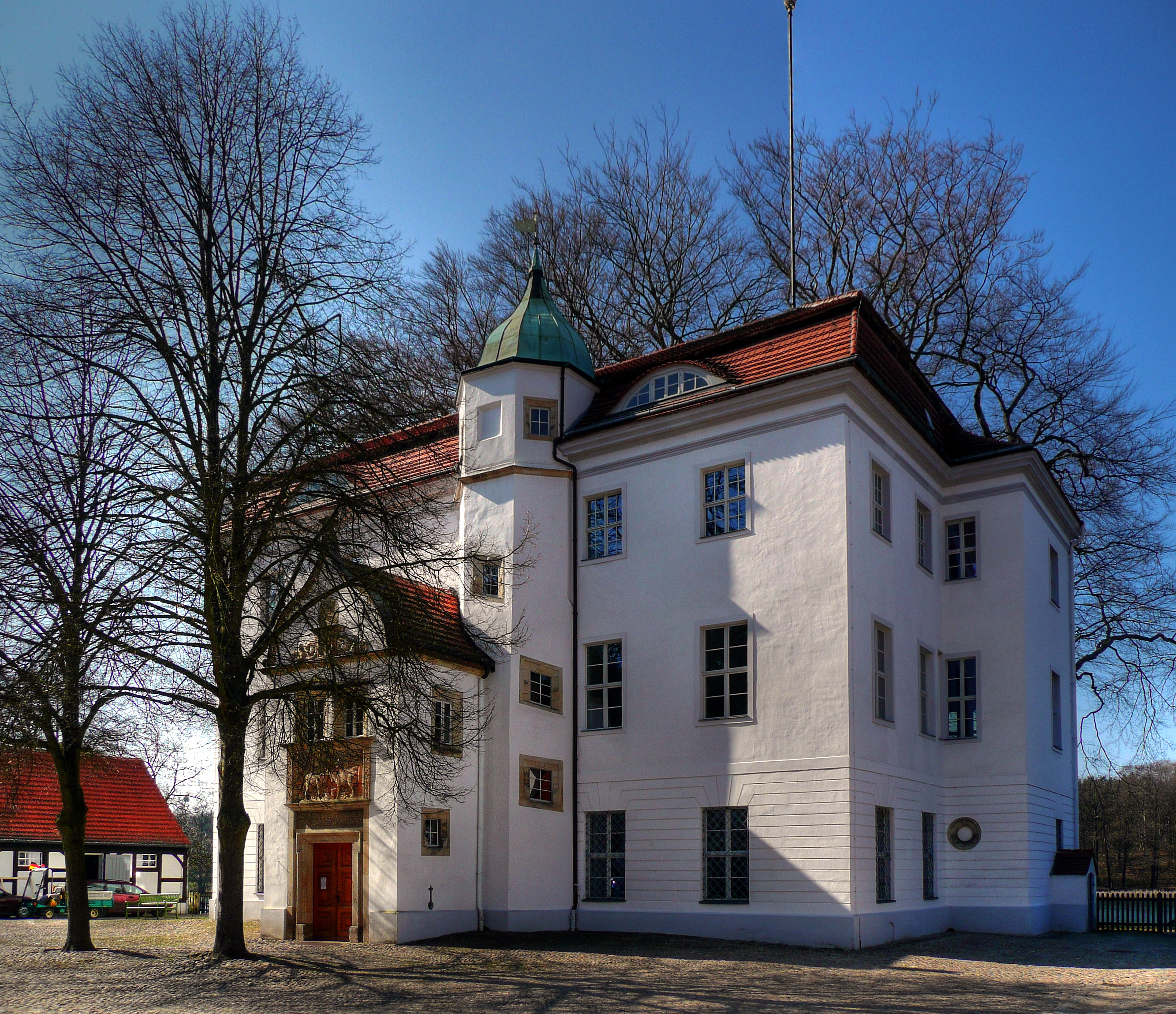 Jagdschloss Grunewald in Berlin